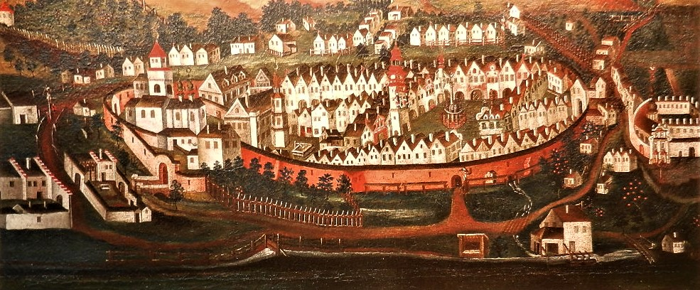 Barockes Stadtbild der böhmische Stadt Arnau, heute Hostinne, um 1730